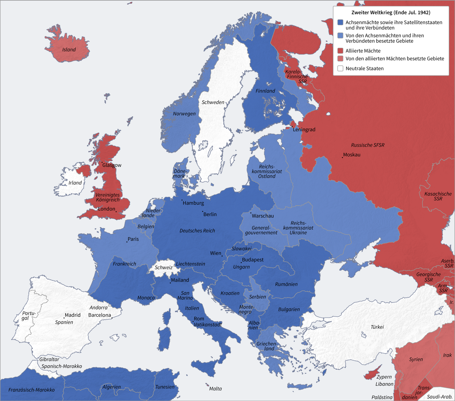 Zweiter Weltkrieg (Ende Jul. 1942)